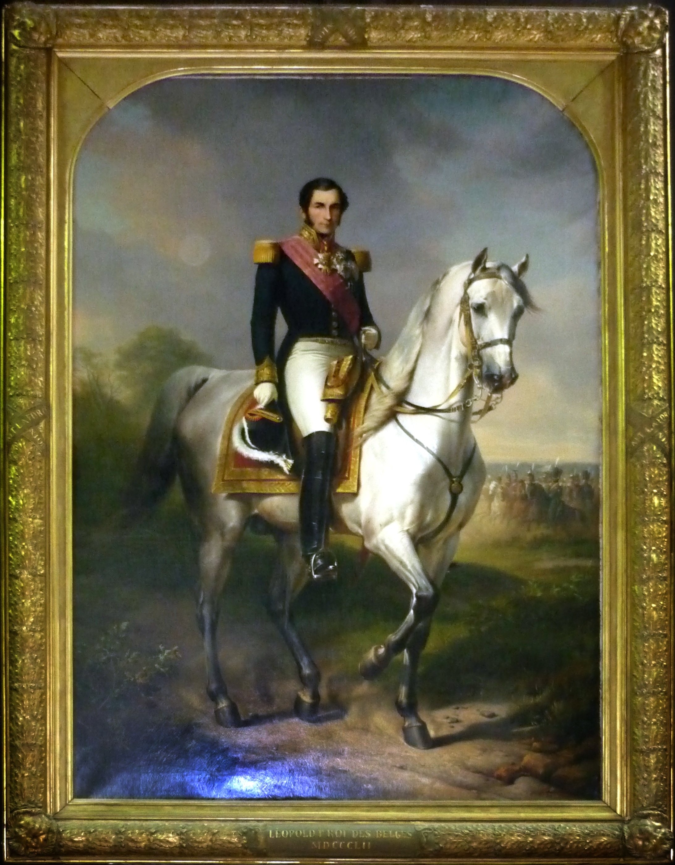 Portrait équestre du Léopold I, Premier Roi des Belges. Eugène Verboeckhoven, Musée de l'Armée, Parc du Cinquantenaire, Bruxelles, Belgique. Wikidata has entry Q26701470 with data related to this item.